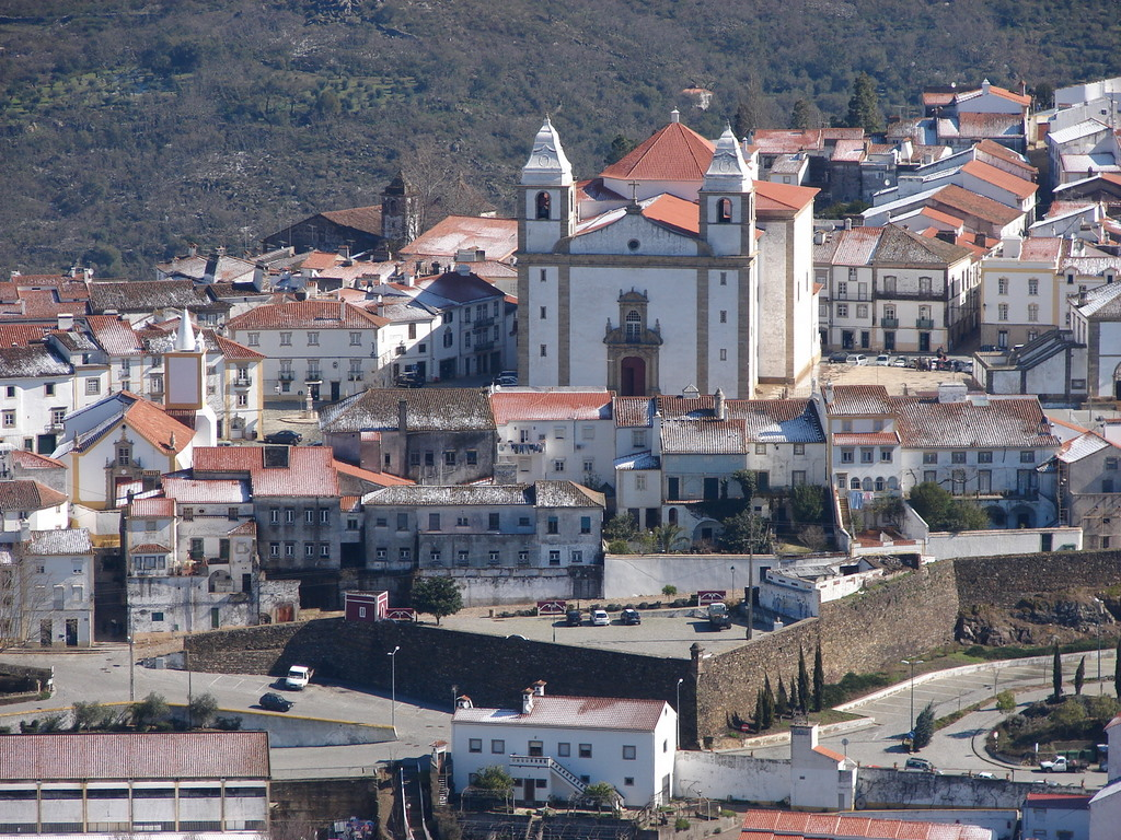 Desde la ermita.